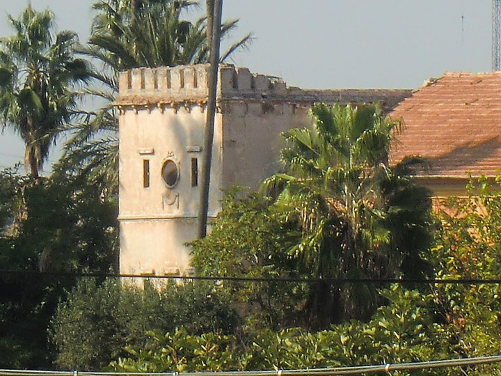 Torre Caradoc